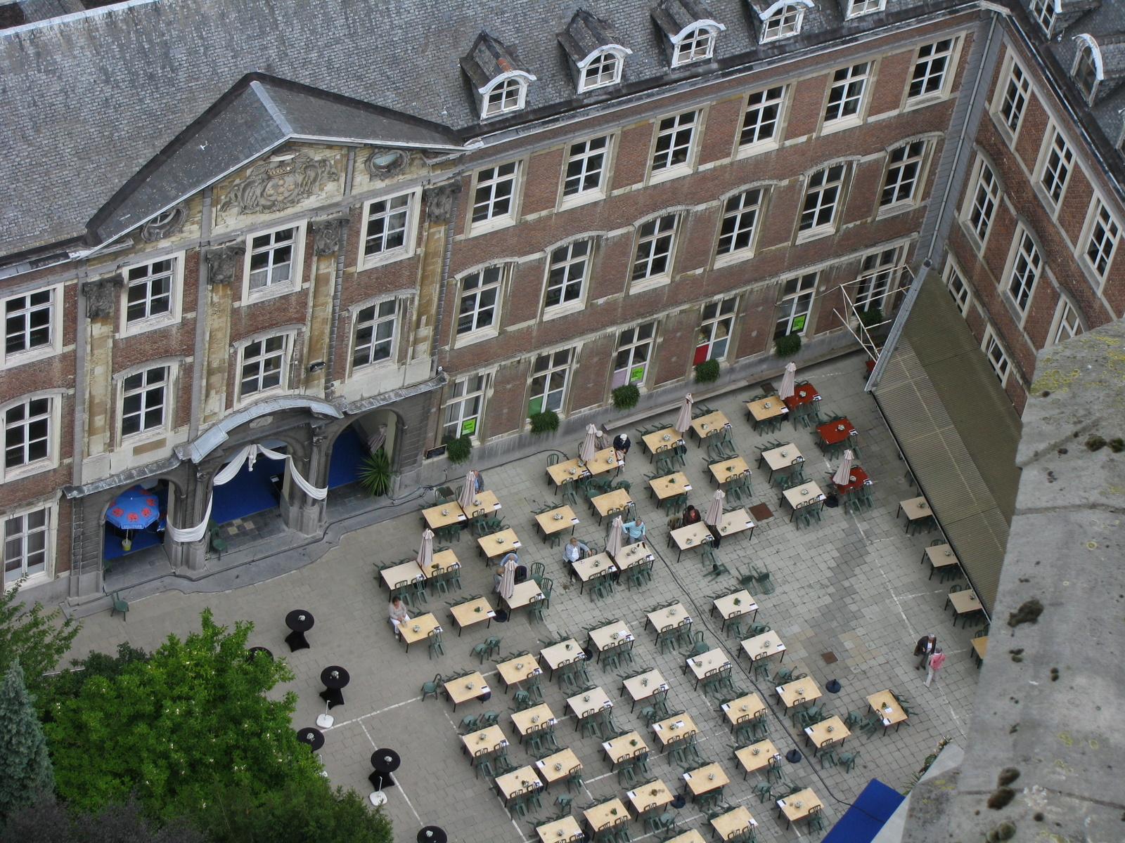 Bisschoppelijk Seminarie (Gent), views from Sint-Baafskathedraal